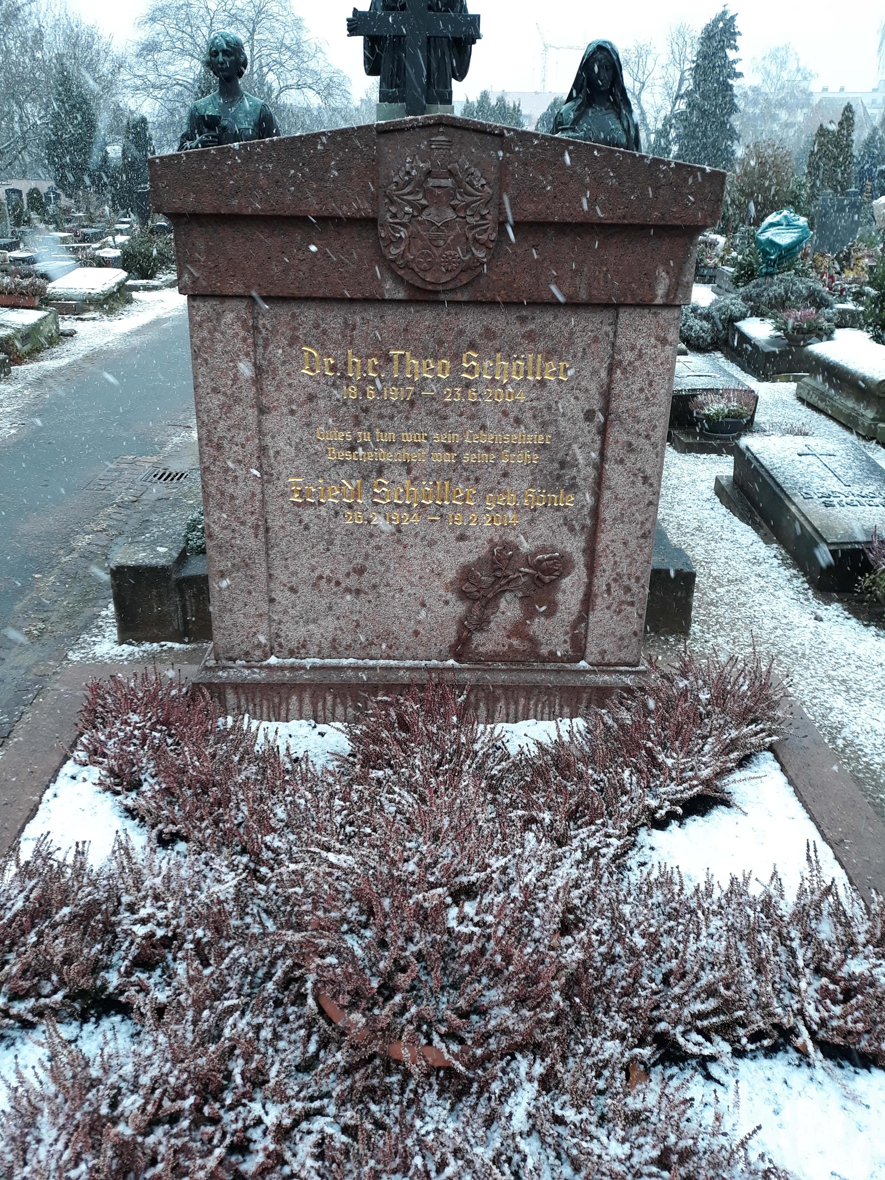 Das Grab des deutschen Unternehmers Theo Schöller und seiner Ehefrau auf dem Johannisfriedhof Nürnberg.